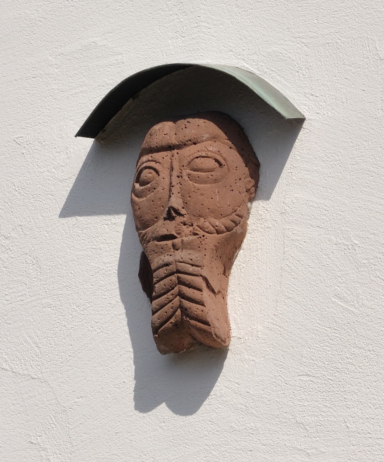 Lörrach: „Heidenköpfle“ über dem Hauptportal der Germanuskirche